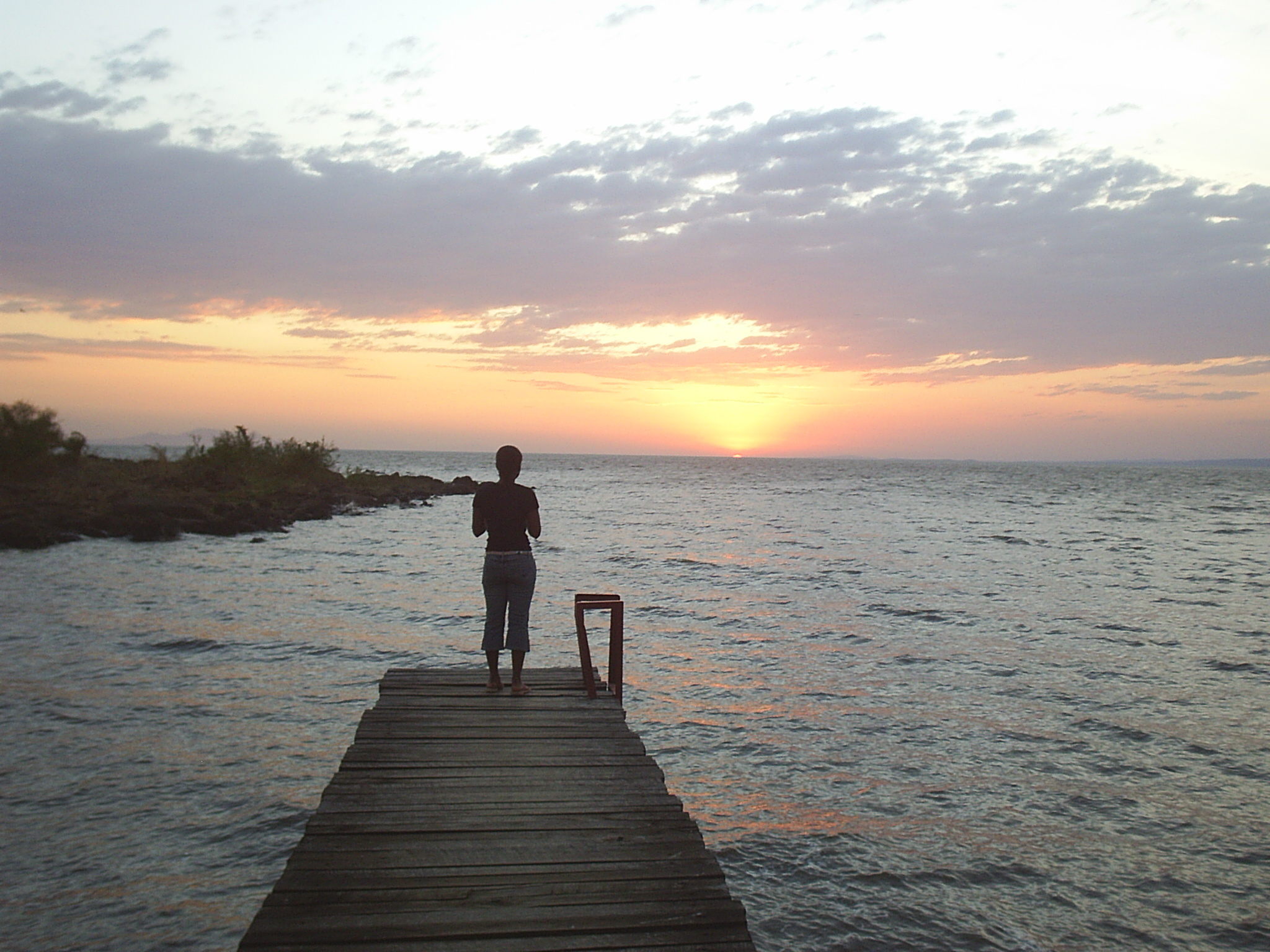 Couché de soleil à Kiboko Bay au sud de Kisumu (Kenya)